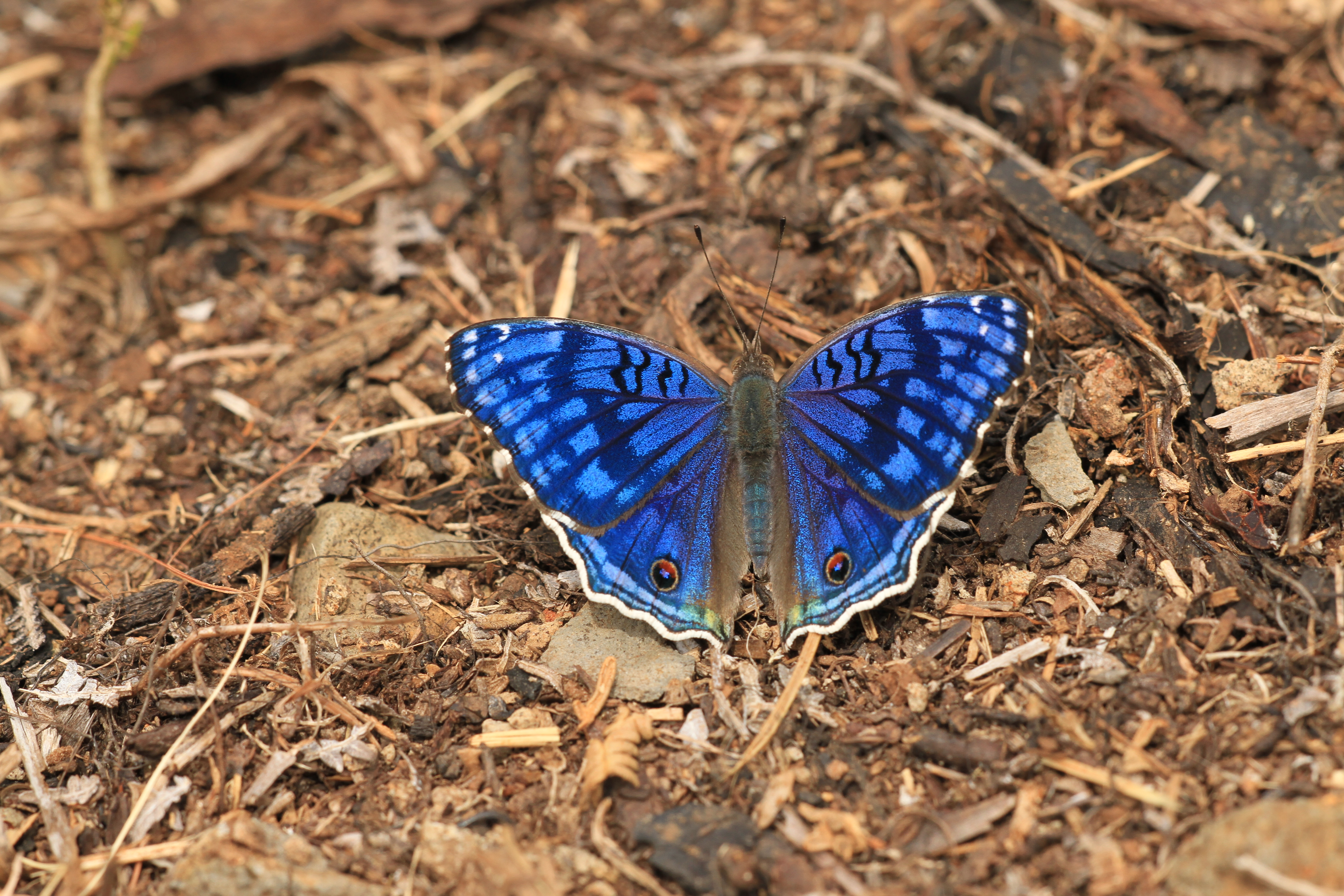 Sujet observé dans les hauts de Saint-Denis (Île de la Réunion) le 17/02/2014